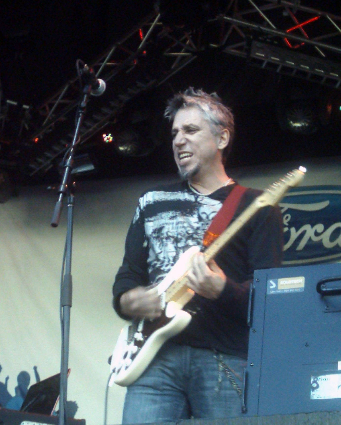 Mike Sawatzki aux FrancoFolies de Montréal